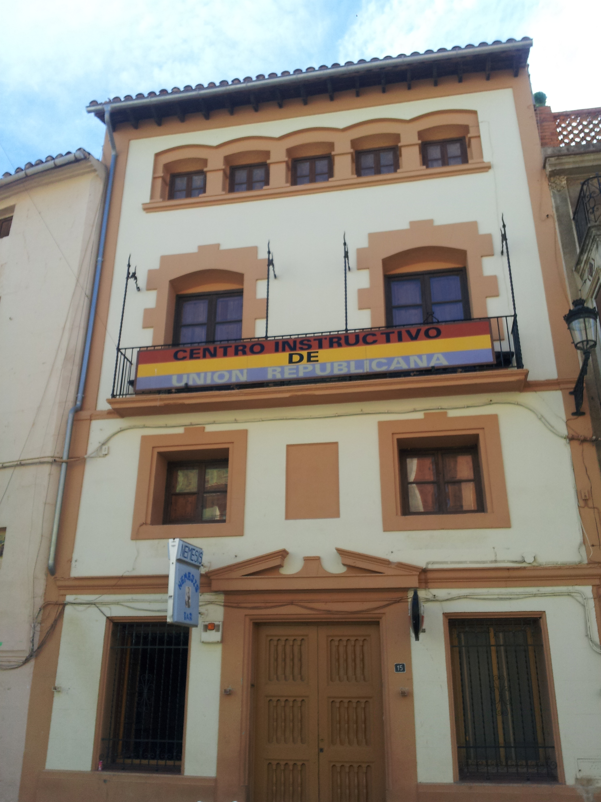 Centre Instructiu d'Acció Republicana de Sogorb, seu d'ARDE.